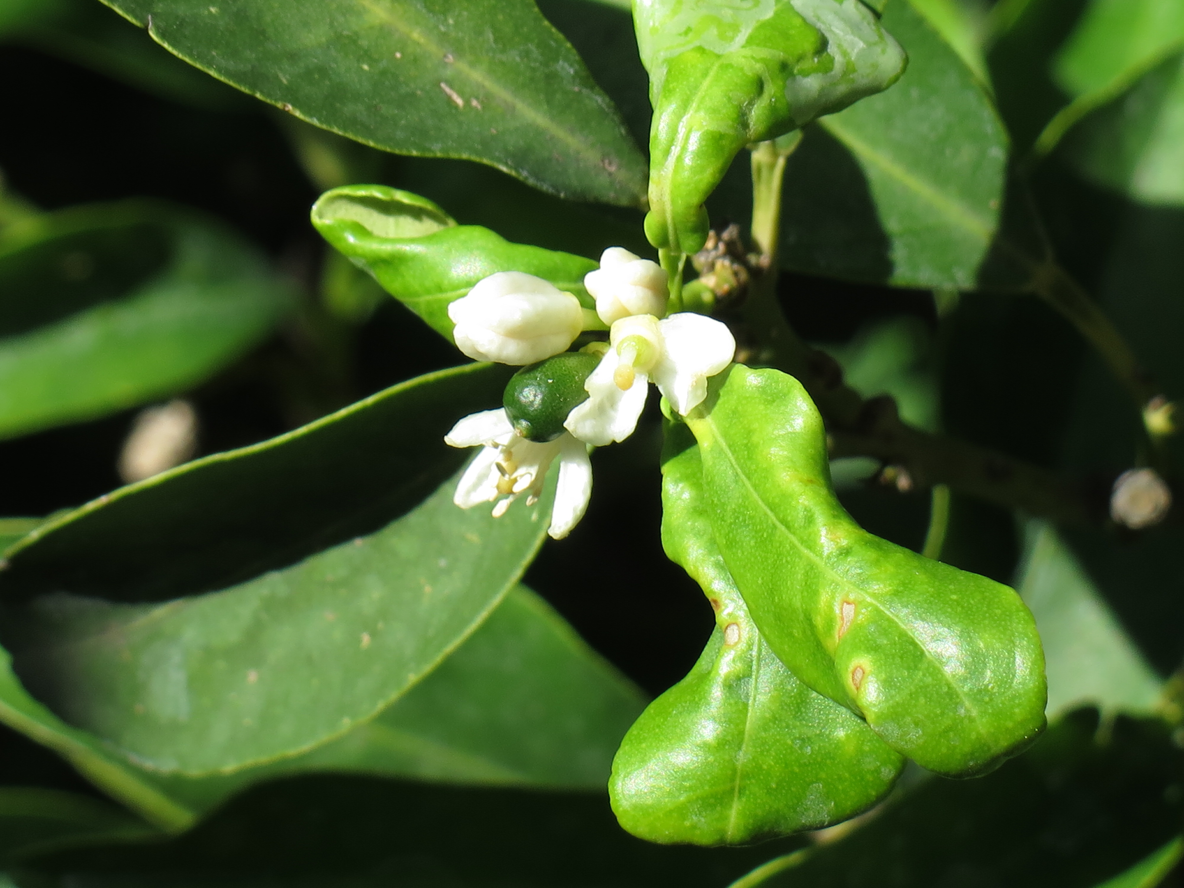 Fiore e frutto della citrus margarita (fortunella)